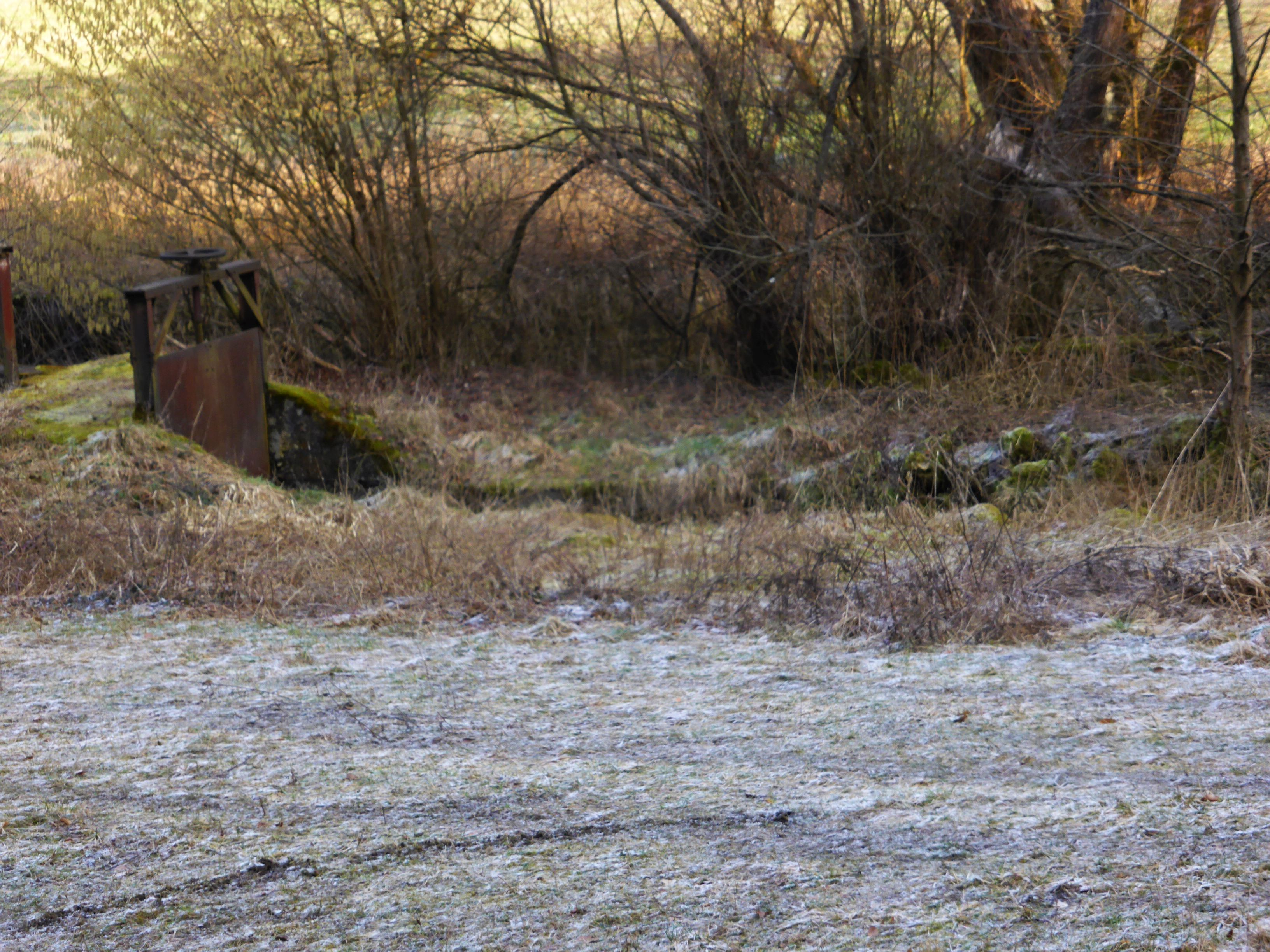 Forellenbach bei Lauf - Reste des ehemaligen Wehrs